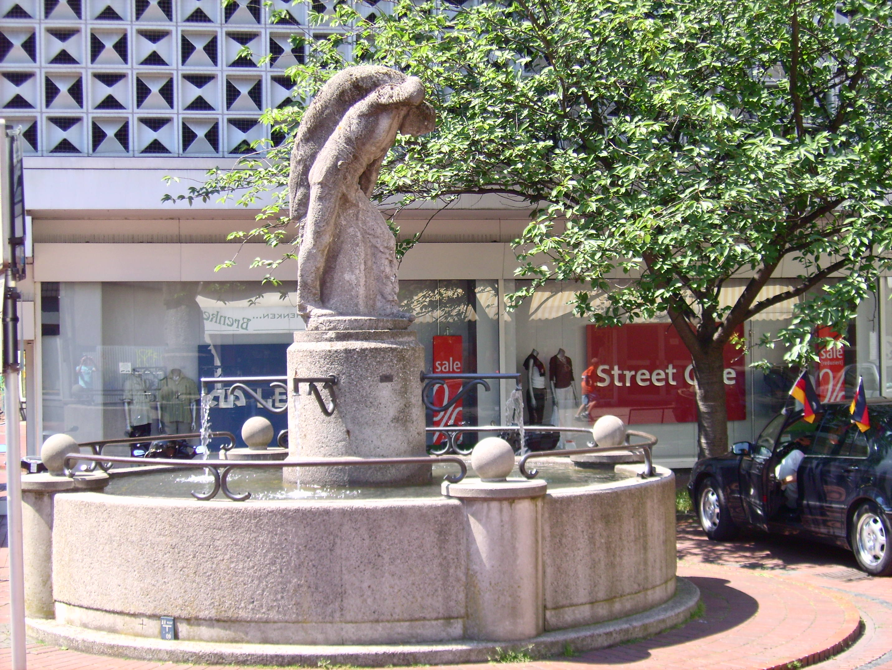 Der Wittener Sackträger This is a photograph of an architectural monument.